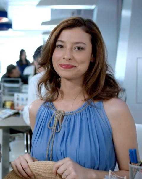 Müjde Uzman'ın da oynadığı Finansbank | CardFinans reklamından bir kare